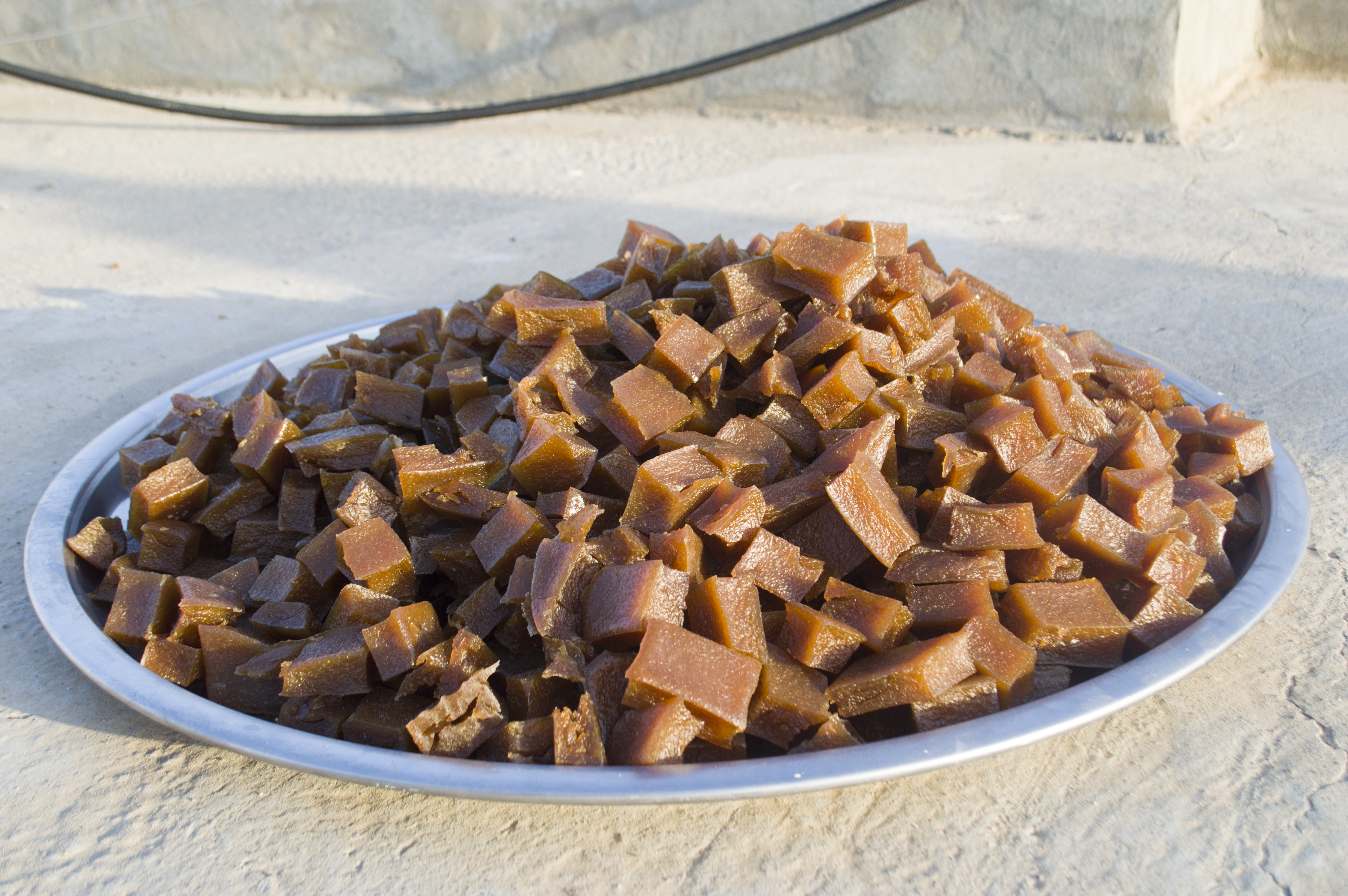 Dilmenin son ve hazır hali .